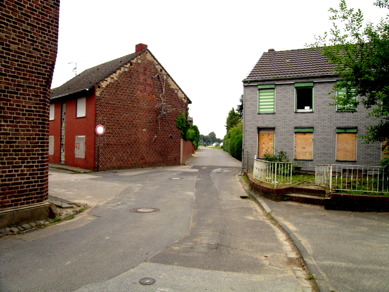 Spenrath, verlassene Häusergruppe „an de Luhr“ – Der Dorfabriss legt auch eine braune Vergangenheit der Ortsgeschichte frei, siehe Ziegelgiebelwand mit eingearbeiteten Hakenkreuz-Emblem von 1933.